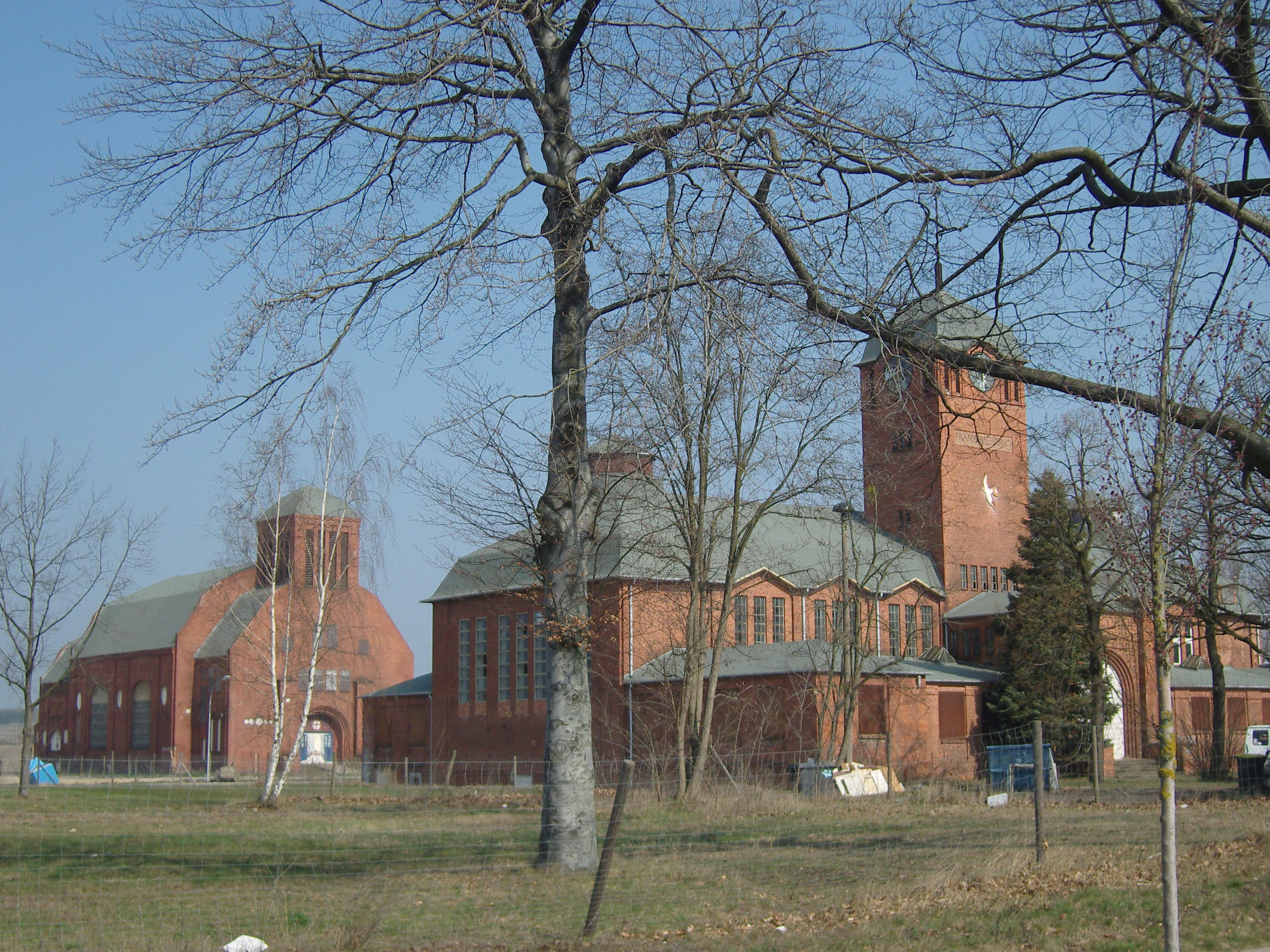 Verwaltungshaus und Badehaus und Maschinenhaus der Brikettfabrik Marga in der Gartenstadt Marga